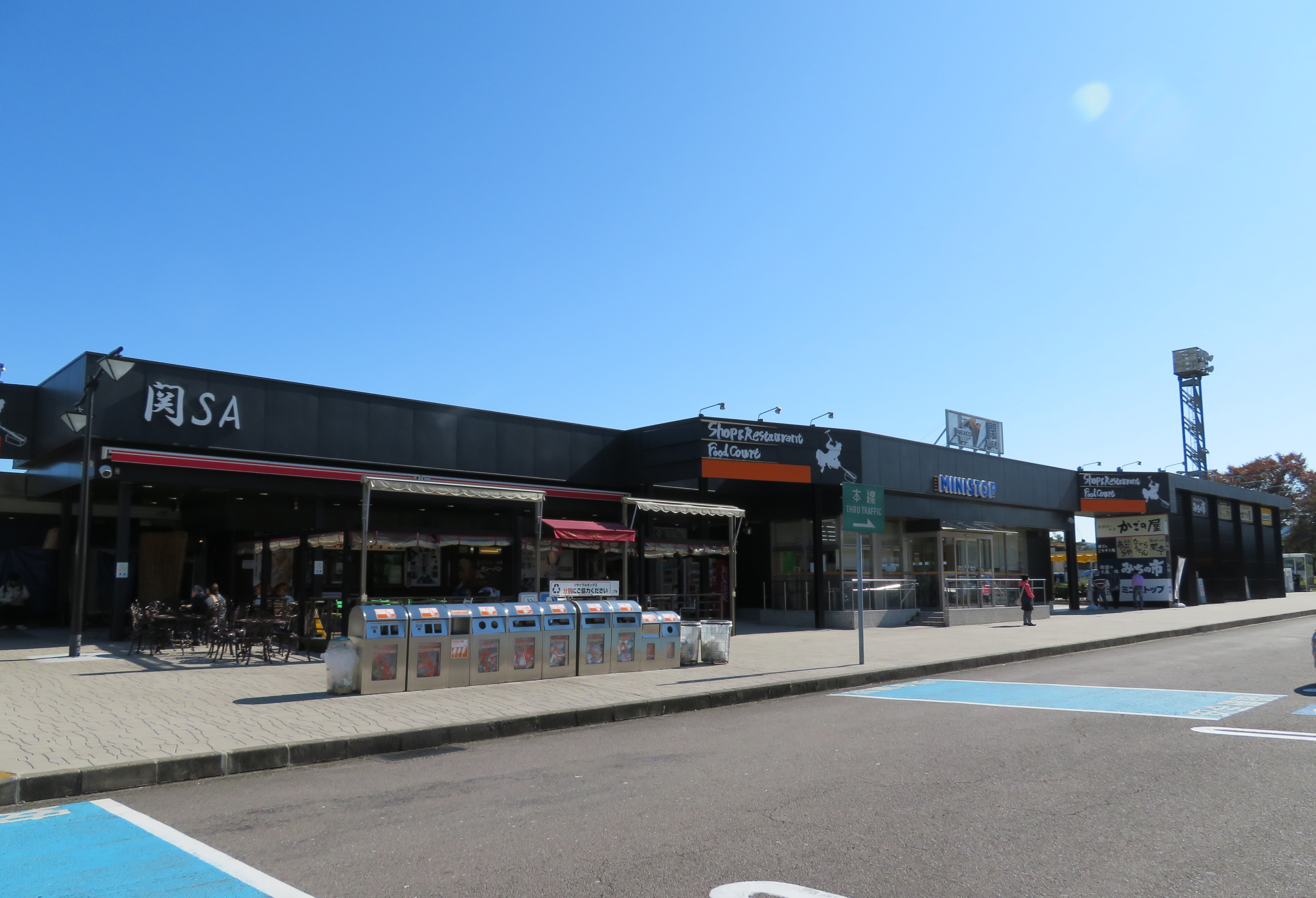 関サービスエリア